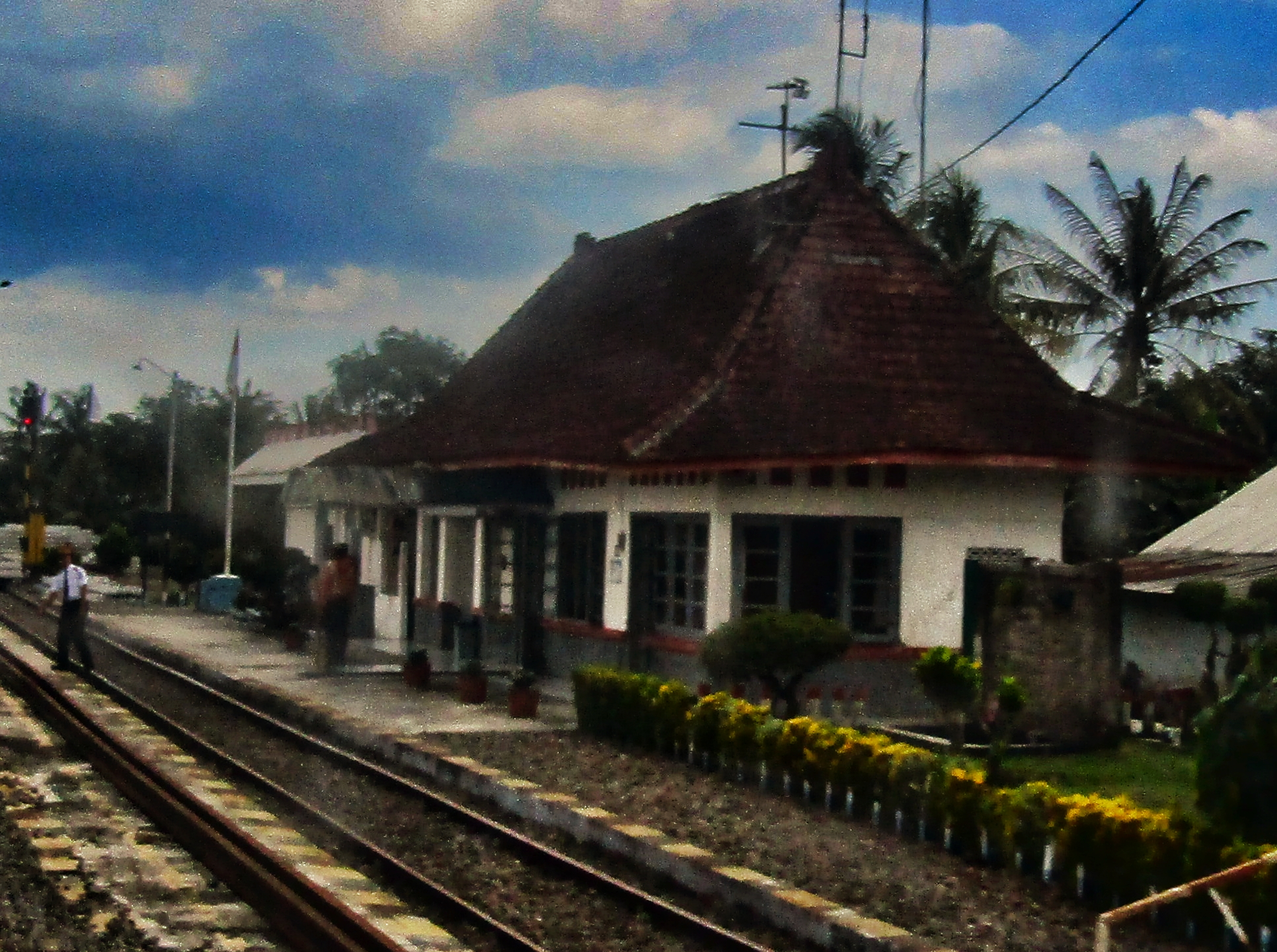 Bangunan utama Stasiun Lebeng, 2020